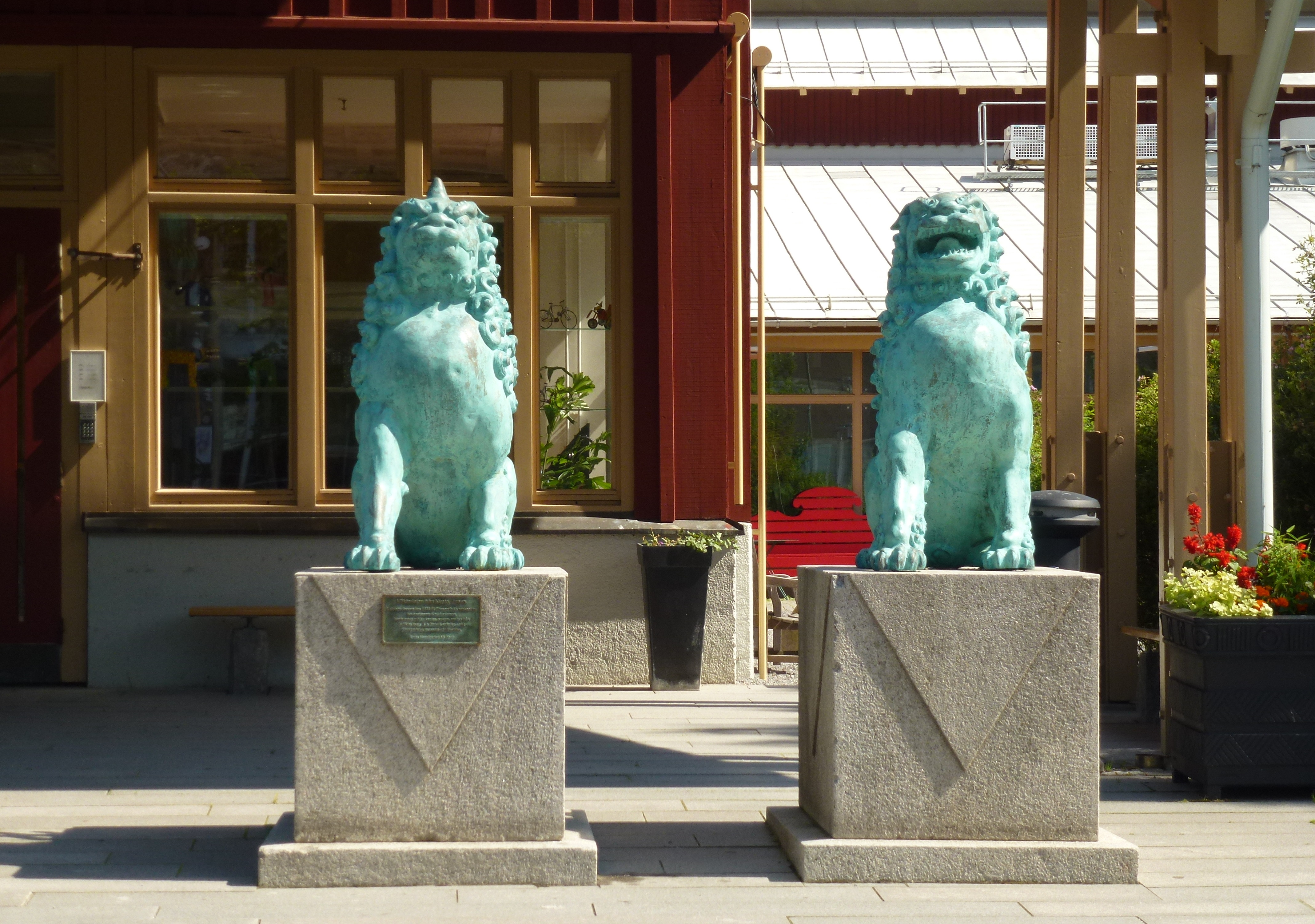 Etnografiska museet i Stockholm, entré